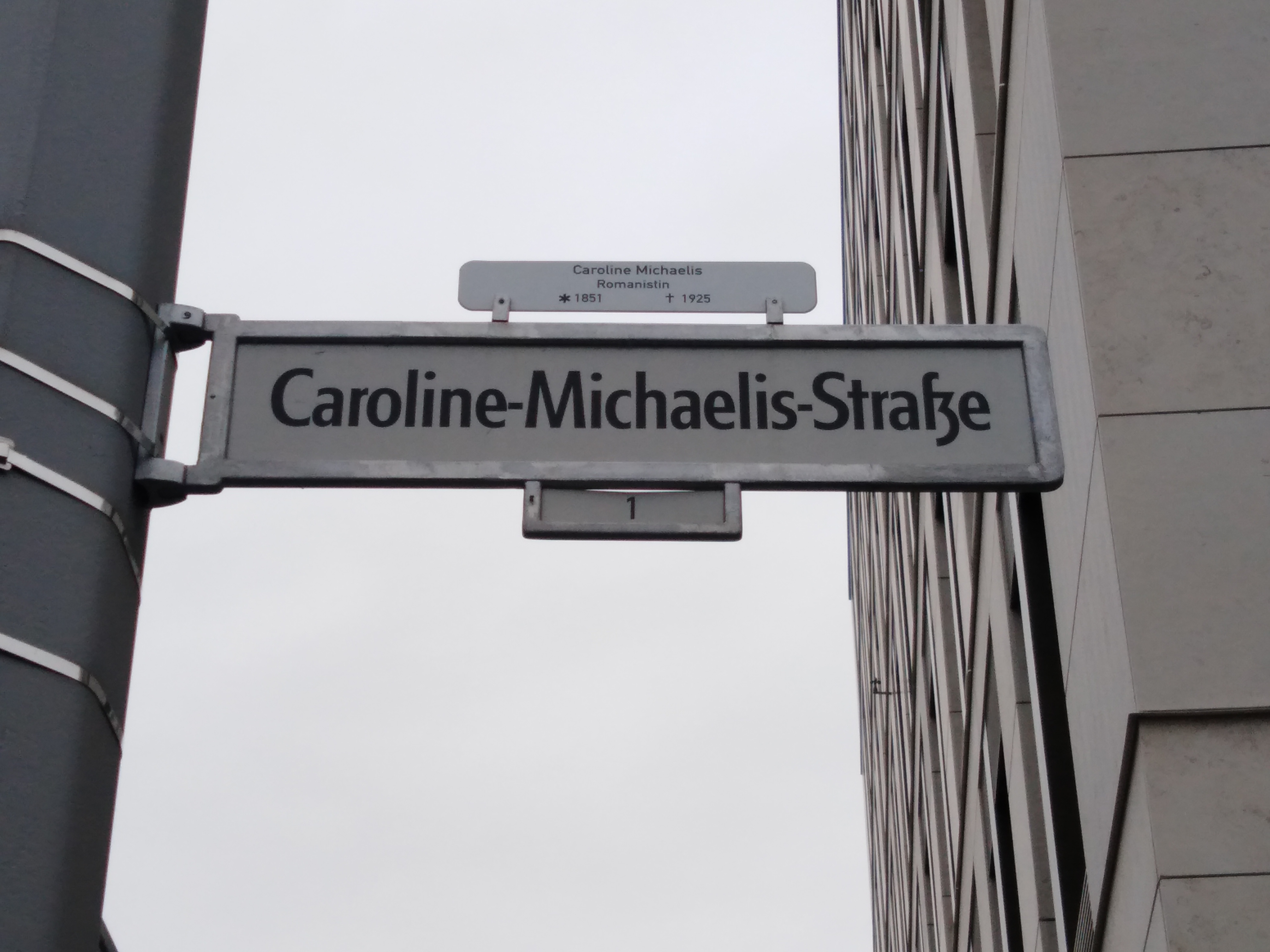 Cartel da rúa de Carolina Michaëlis en Berlín